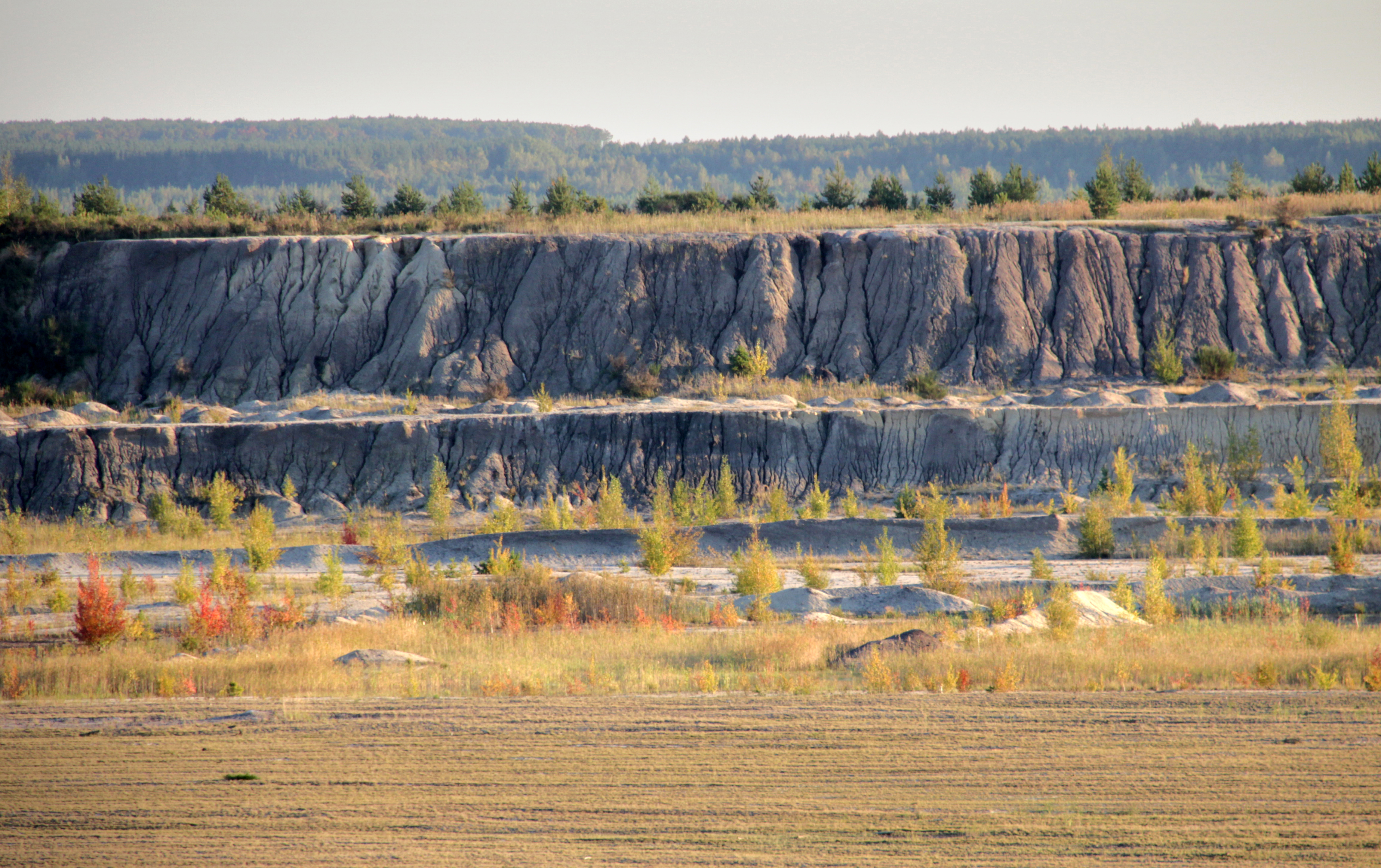 Eines der größten Gebiete der NABU-Stiftung Nationales Naturerbe, der ehemalige Braunkohletagebau Grünhaus in der Lausitz; das Gebiet der Stiftung beträgt circa 2000 Hektar. Es soll sich zur Wildnis entwickeln. Wölfe sind schon fotografiert worden..